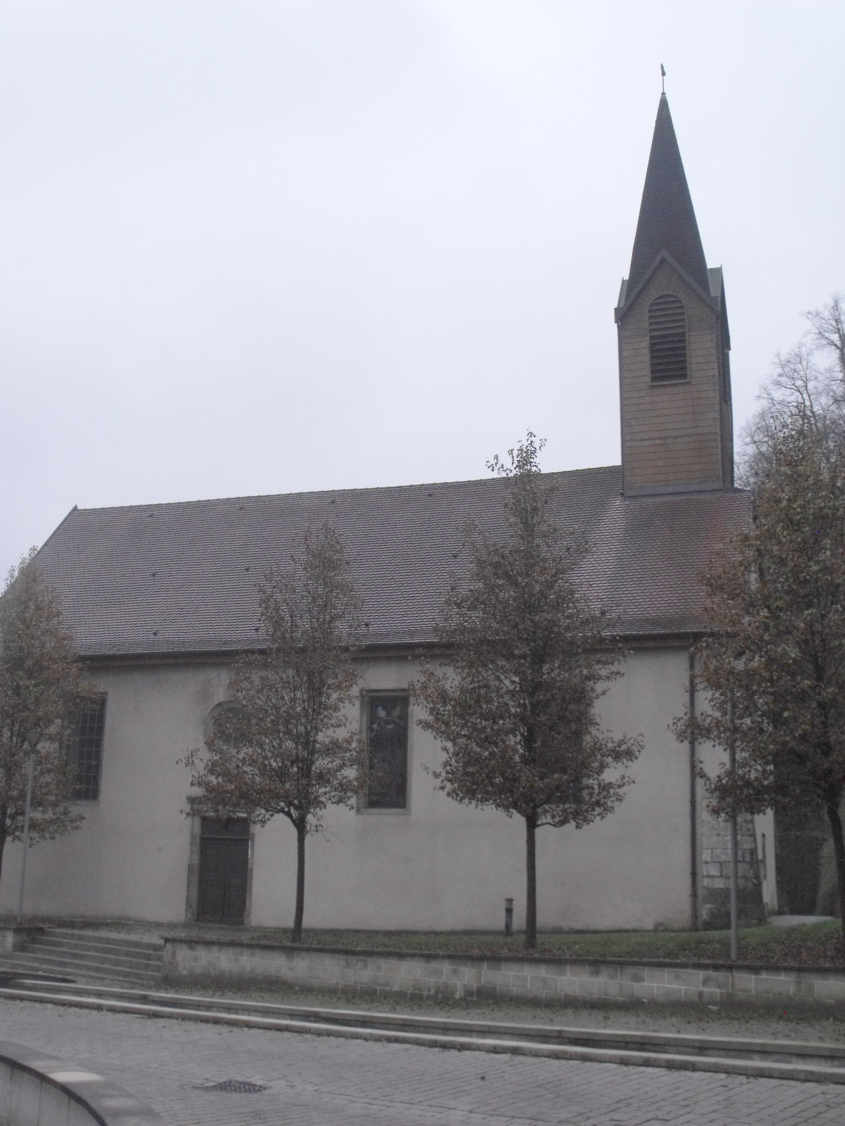 Temple, Sainte Suzanne (Doubs, France)